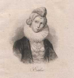 Ruiny domu i portret Esterki (fragment)